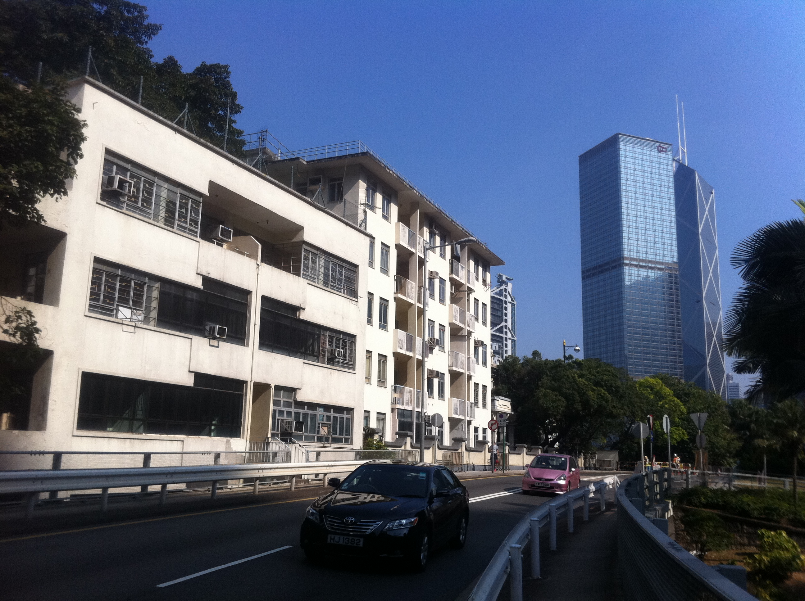 中文（香港）: 香港島 半山區 上亞厘畢道 宿舍住宅